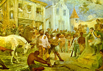 Felipe dos Santos, Revolta de Vila Rica.